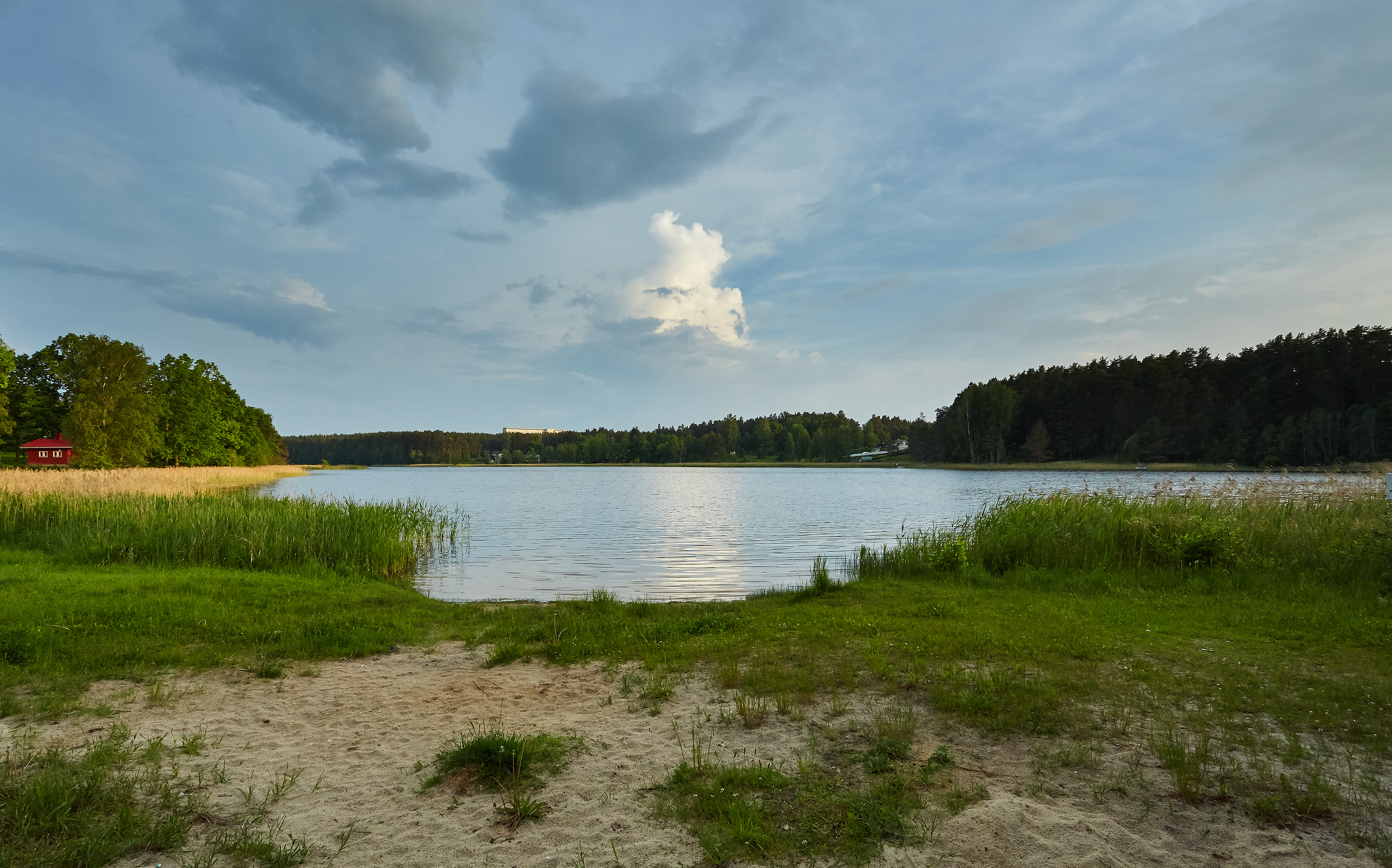 Kubija järv Võrumaal